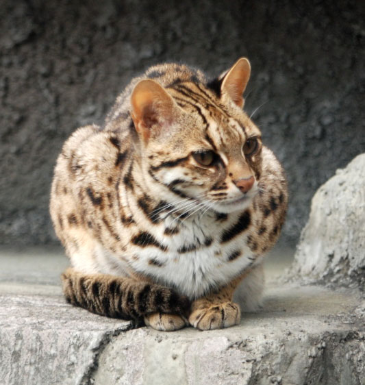 天王寺動物園のベンガルヤマネコ。